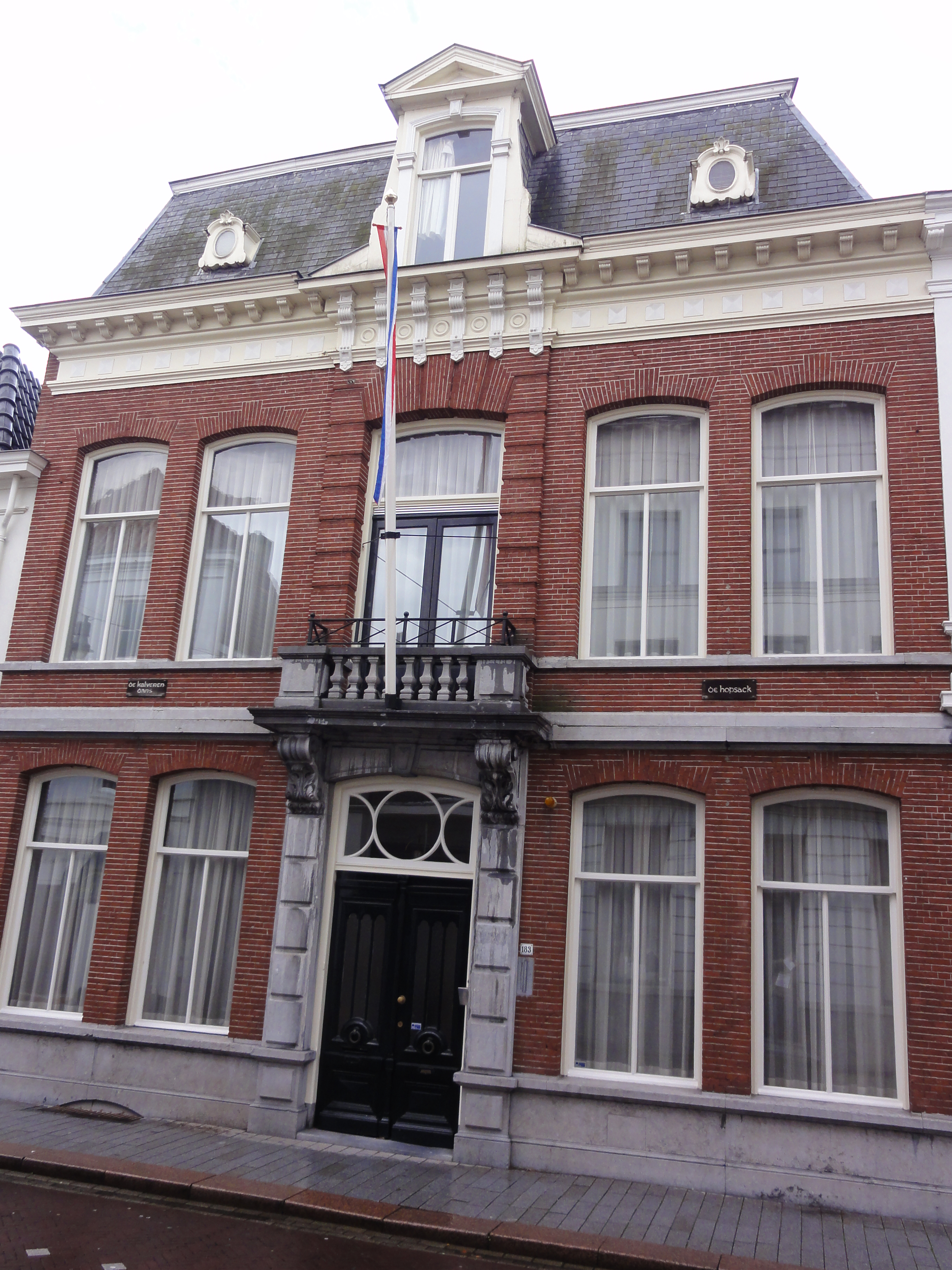 's-Hertogenbosch Rijksmonument 522467 Hinthamerstraat 183 92″ N, 5° 18′ 44.05″ E Object location51° 41′ 17.98″ N, 5° 18′ 45.55″ E